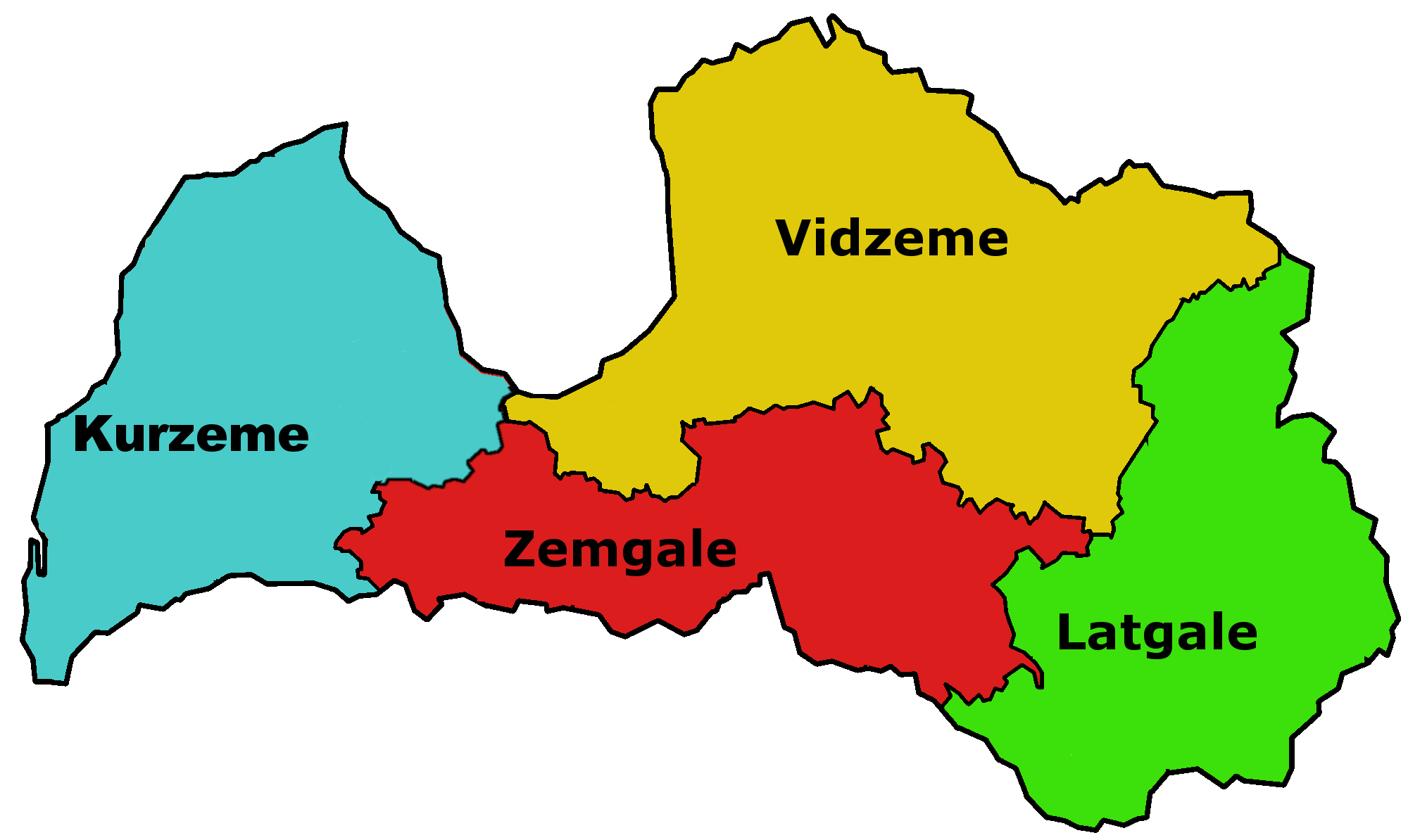 Carte des différentes régions de Lettonie